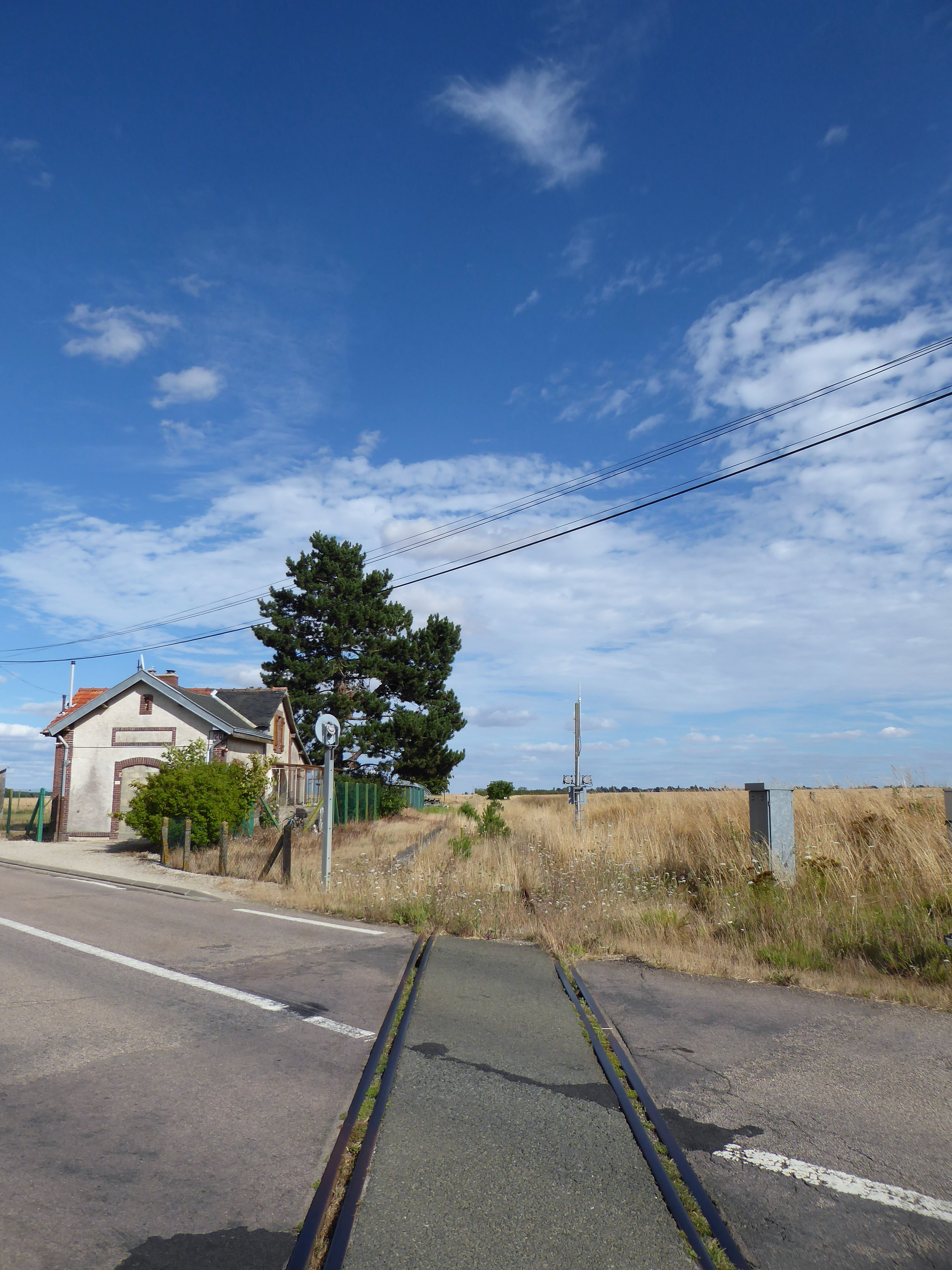 Ancien point d'arrêt "Villette-les-Bois-Chêne-Chenu" de la ligne Chartres-Dreux, Tremblay-les-Villages, Eure-et-Loir, France.